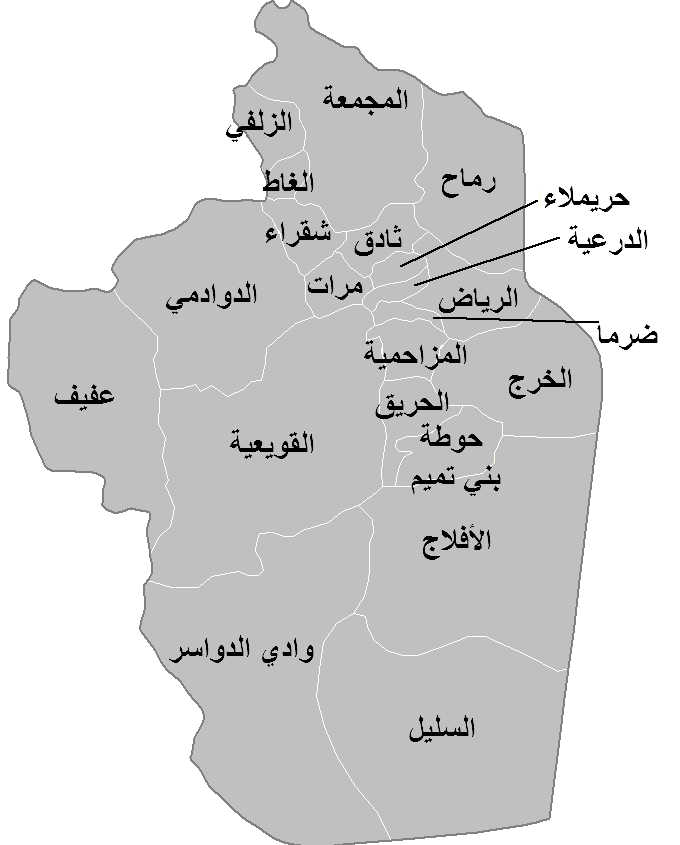 محافظات منطقة الرياض بالعربية.